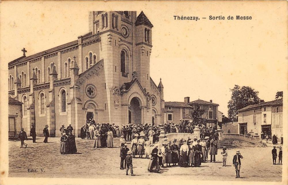 Sortie de messe à l'église Saint-Honoré de Thénezay (inaugurée en octobre 1903) entre 1904 et 1910.